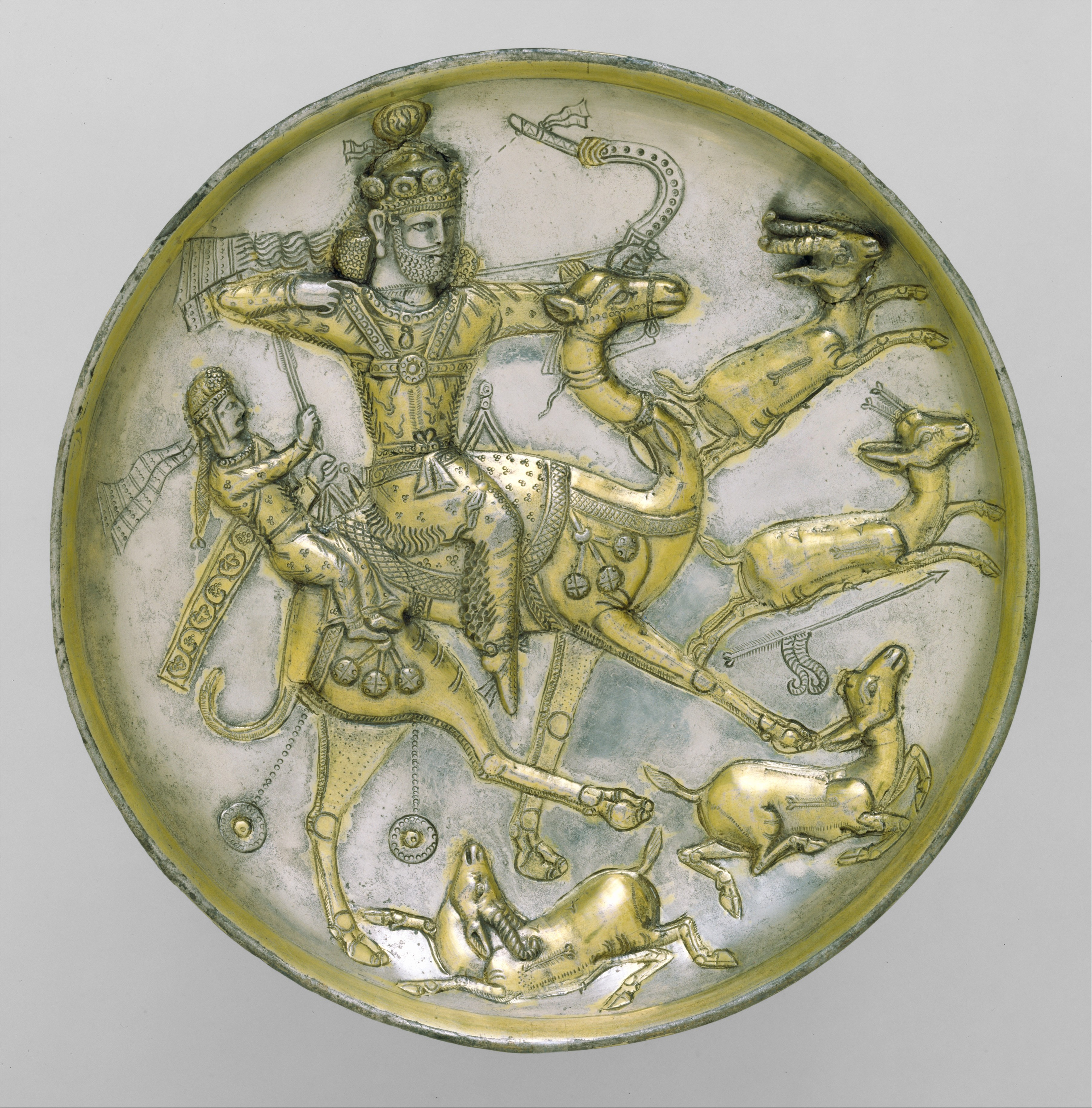 Sasanian; Plate; Metalwork-Vessels-Inscribed